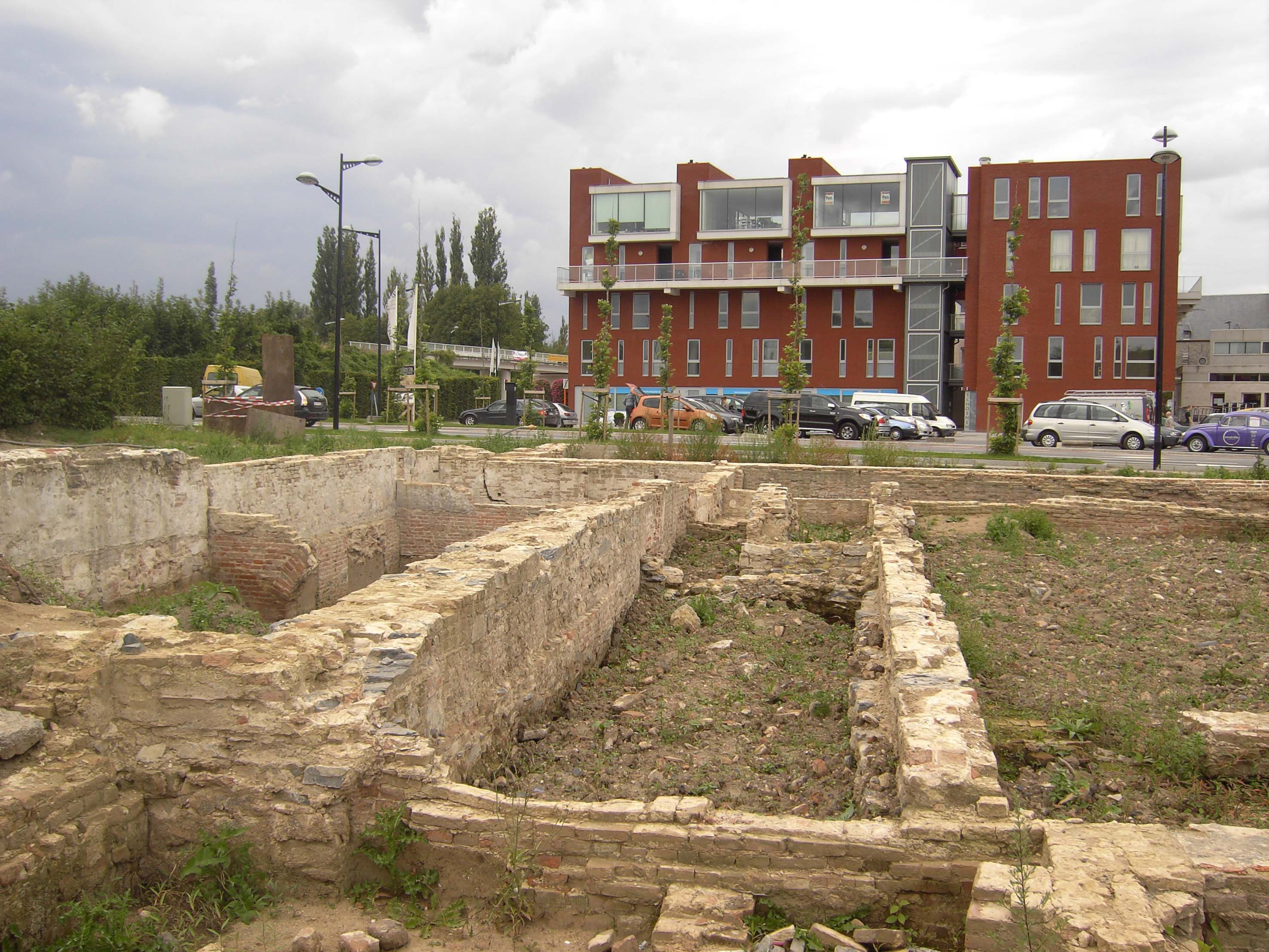 Oudenaarde - Oost-Vlaanderen - België. Opgravingen op De Ham, nabij de vroegere Schelde.